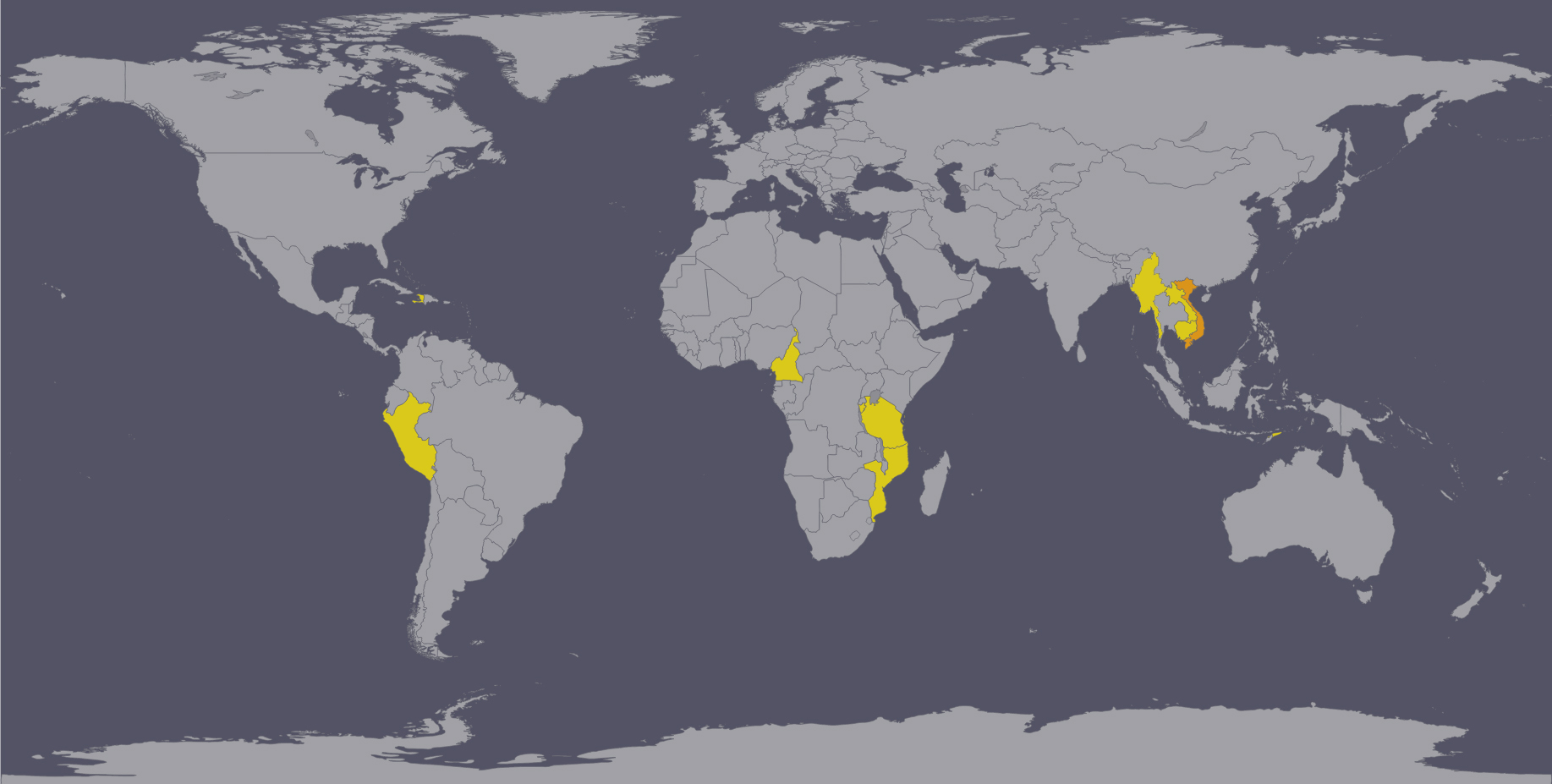 Bản đồ 10 thị trường nước ngoài Viettel đang đầu tư tính đến tháng 11/2019